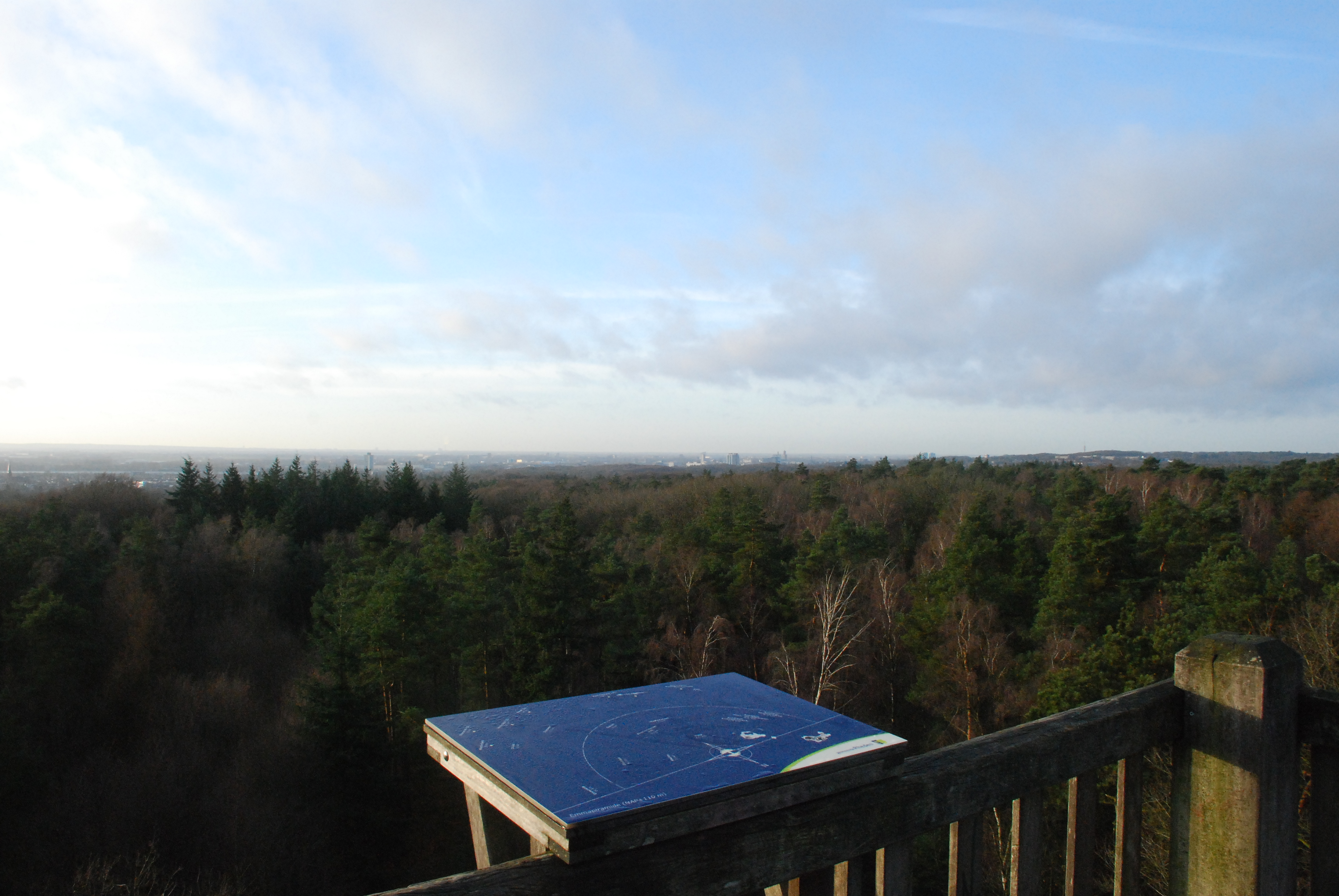 Uitzichtlijnen Emma Piramide